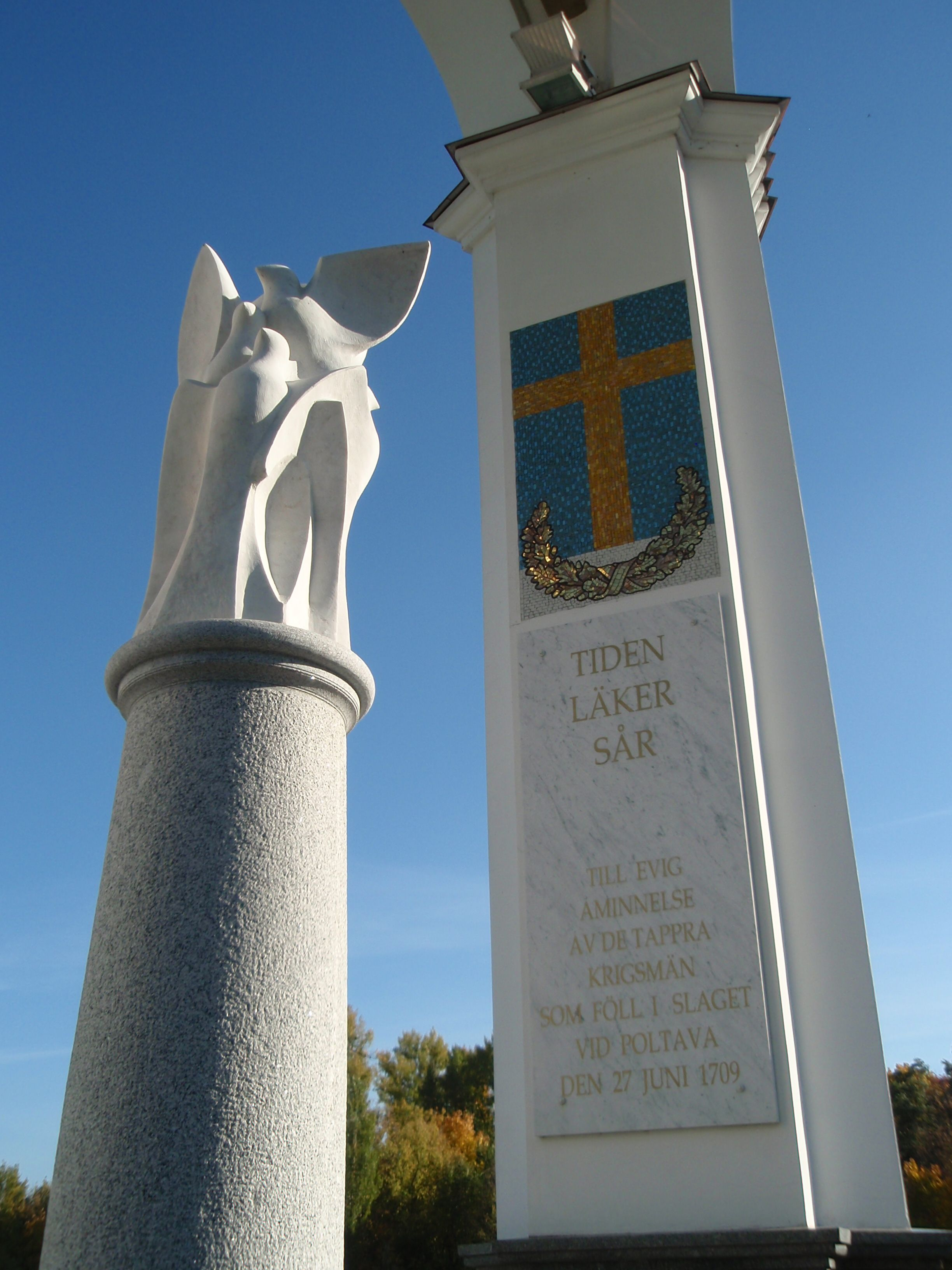 Комплекс пам'яток на історичному місці полі Полтавської битви «Поле Полтавської битви», Полтава, північно-західна околиця міста, вул. Шведська Могила, 32